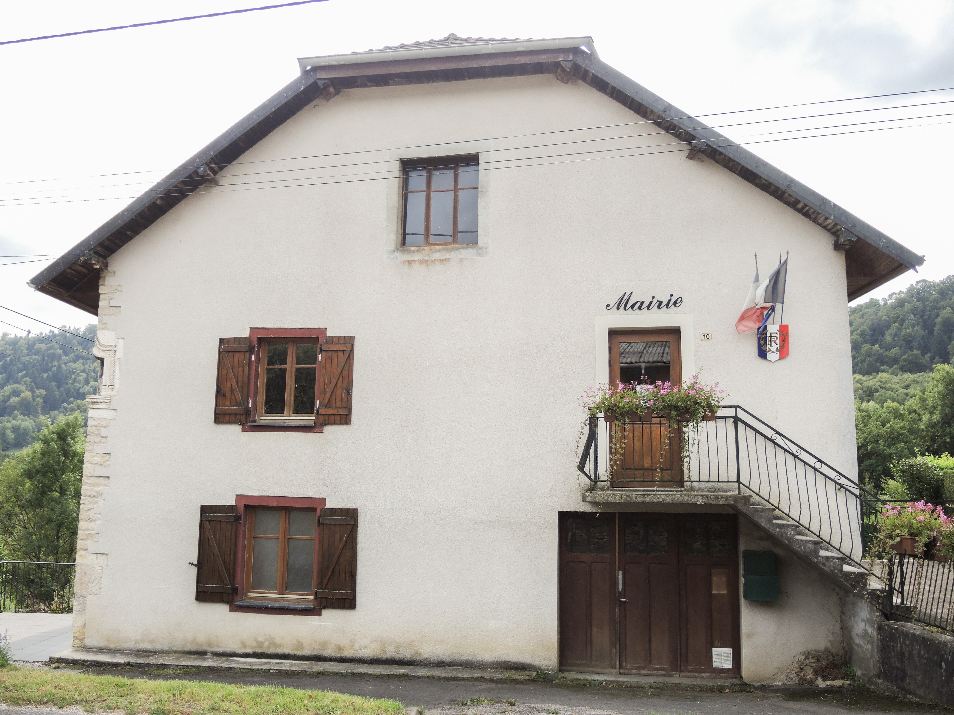 Mairie de Vaucluse. Doubs